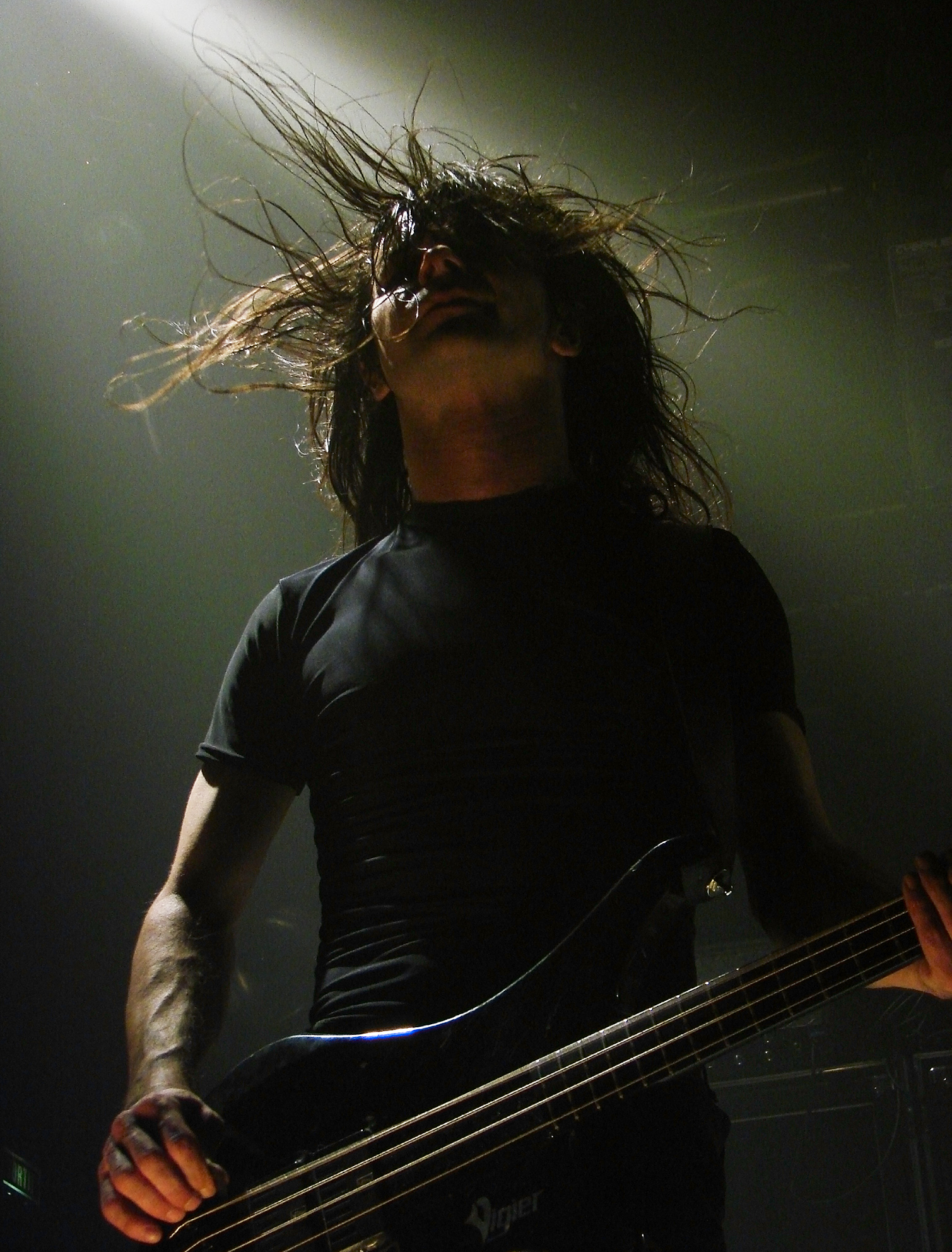 Samael en concert à la Locomotive, à Paris, le 11 Janvier 2009: Mas à la basse.